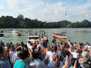 Chegada da Santa